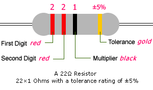 color-code